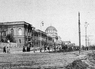 Rustawelis Gamsiri (damals Golowin-Boulevard), Palast des russischen Vizekönigs, Tiflis, Georgien